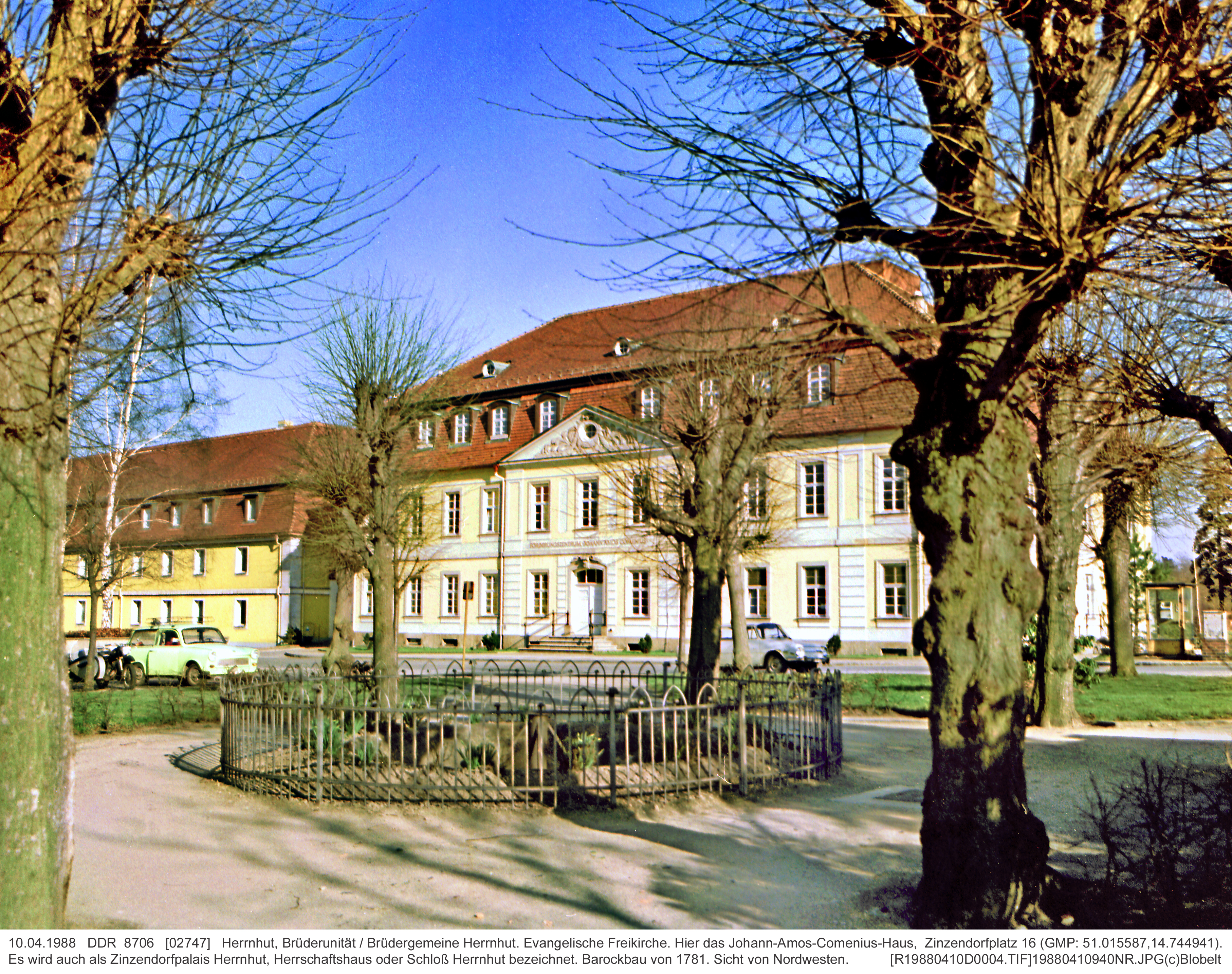 10.04.1988 DDR 8706 [02747] Herrnhut, Brüderunität / Brüdergemeine Herrnhut. Evangelische Freikirche. Hier das Johann-Amos-Comenius-Haus, Zinzendorfplatz 16 (GMP: 51.015587,14.744941). Es wird auch als Zinzendorfpalais Herrnhut, Herrschaftshaus oder Schloß Herrnhut bezeichnet. Barockbau von 1781. Sicht von Nordwesten. [R19880410D0004.TIF]19880410940NR.JPG(c)Blobelt